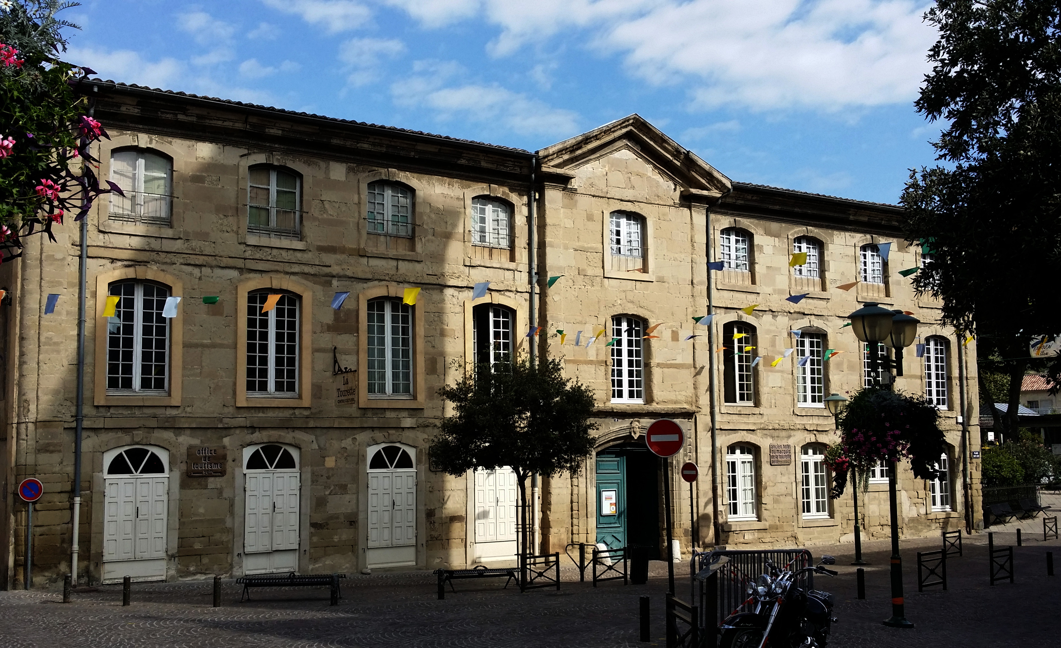 Hôtel du Marquis de la Tourette, situé à Tournon-sur-Rhône en France